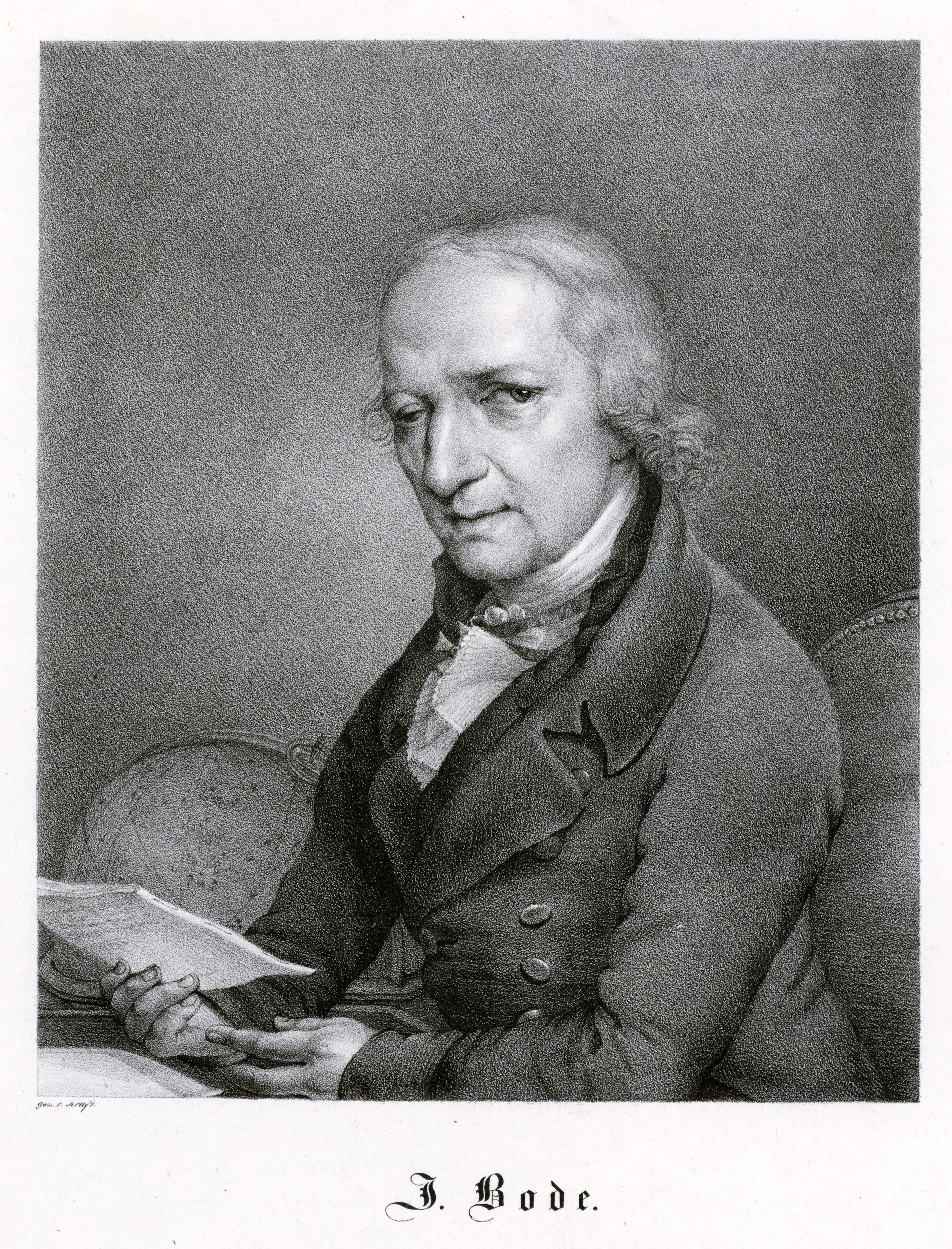 J. Bode